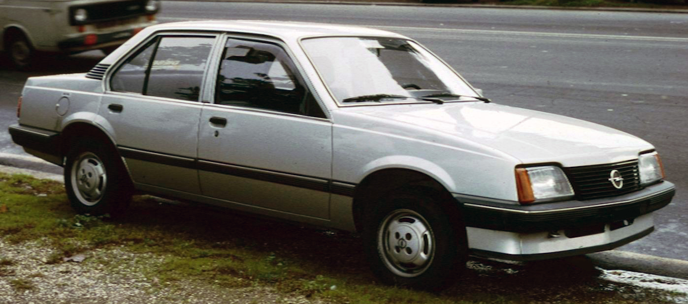 Opel Ascona C